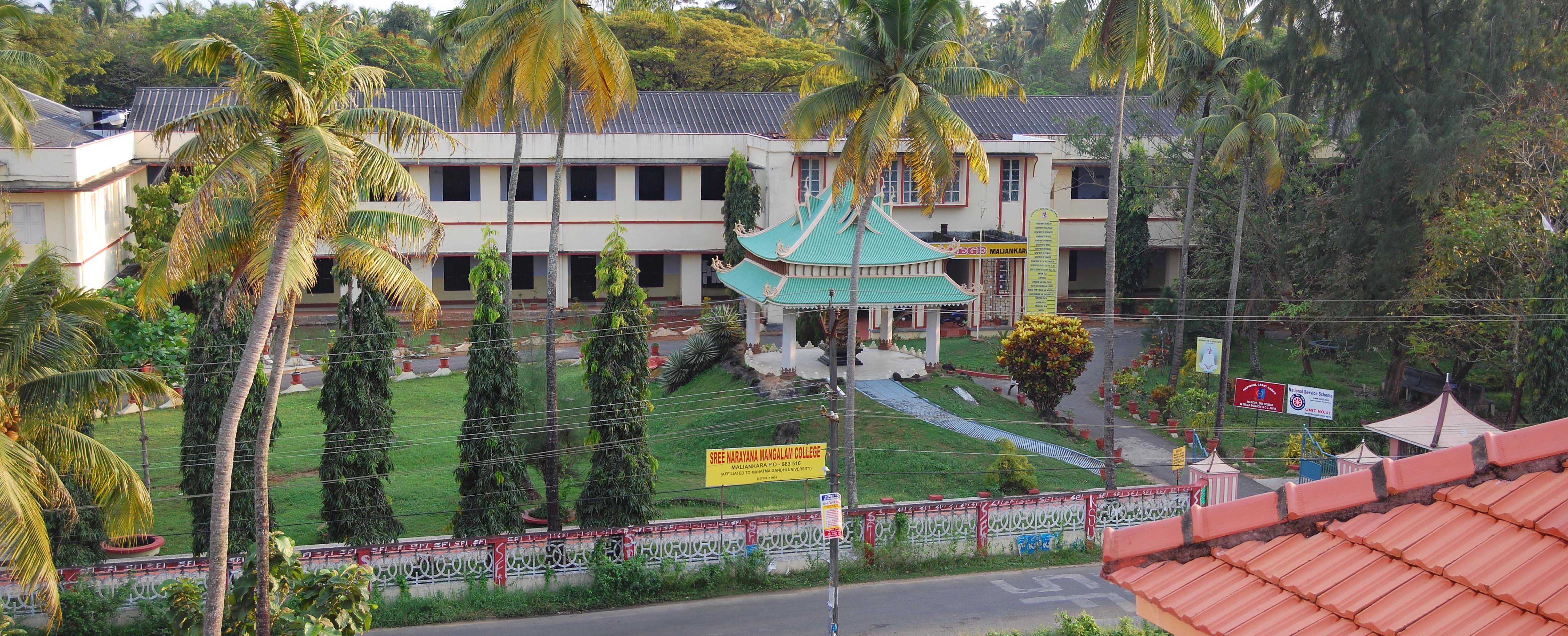 Srree_Narayana_mangalam_college-Maliankara